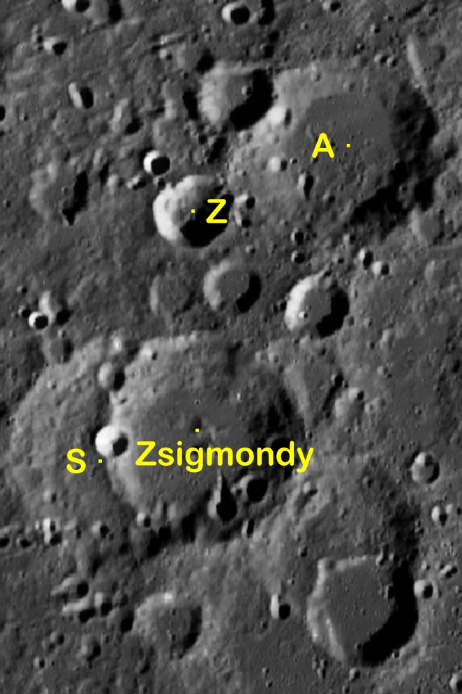 Cráter lunar Zsigmondy. Cráteres satélite. (Imagen LRO)